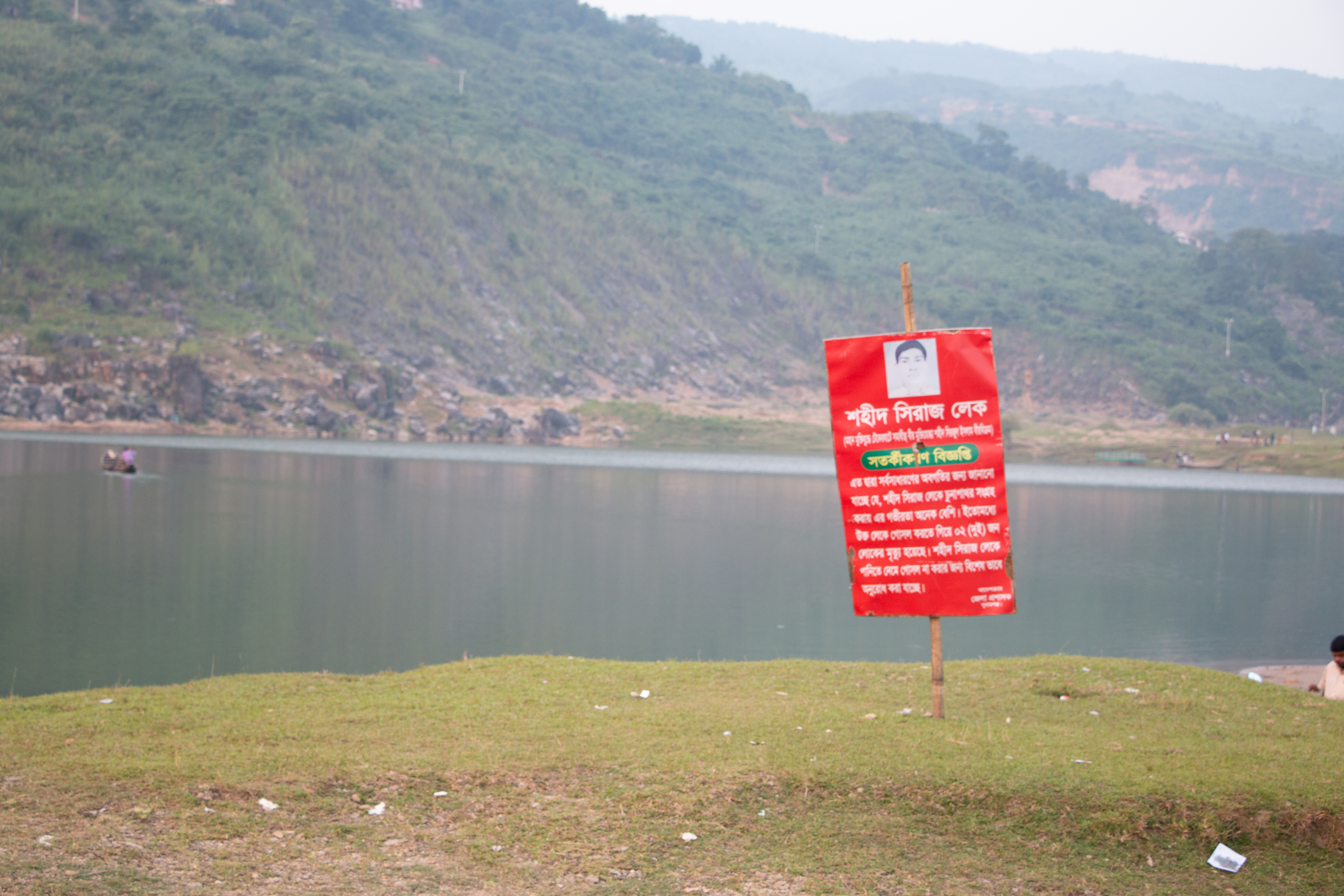 দুর্ঘটনা প্রবণ লেক, লেকের পানিতে গোসল করতে নেমে মৃত্যুর উদাহরণ আছে।